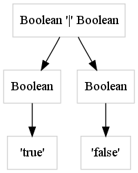 Imagem de árvore de análise sintática.